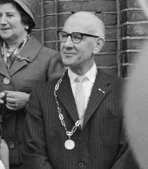 Collectie / Archief : Fotocollectie Anefo Reportage / Serie : [ onbekend ] Beschrijving : Oesterfeest in Ierseke Datum : 8 september 1961 Locatie : Yerseke, Zeeland Trefwoorden : feesten Fotograaf : Pot, Harry / Anefo Auteursrechthebbende : Nationaal Archief Materiaalsoort : Negatief (zwart/wit) Nummer archiefinventaris : bekijk toegang 2.24.01.05 Bestanddeelnummer : 912-9045